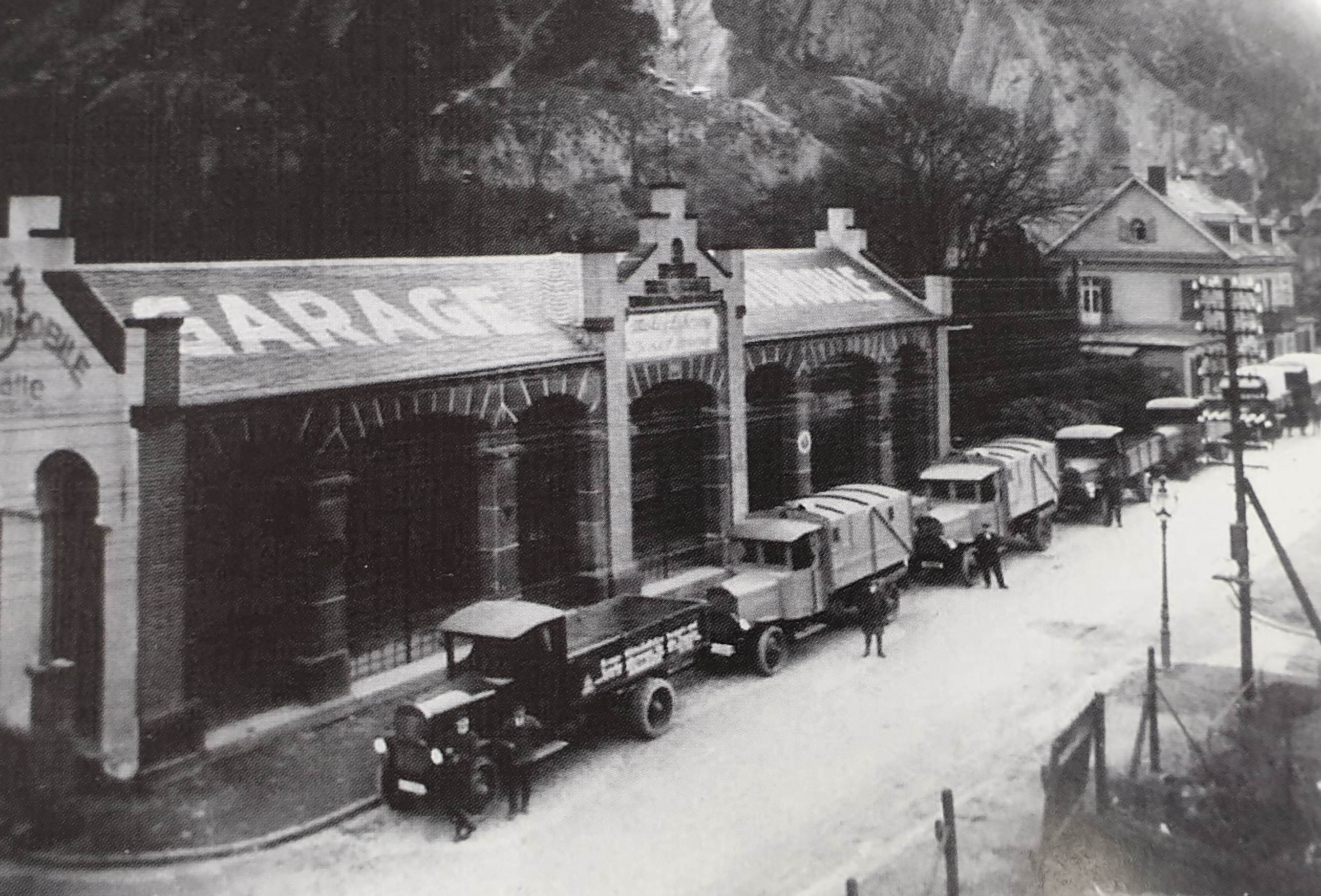 Stammhaus der Firma KBM in Andernach 1924